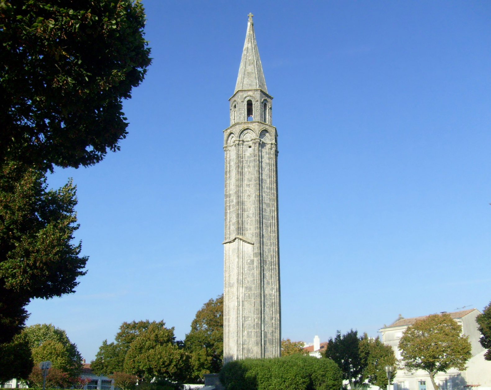 La lanterne des morts de St Pierre d'Oléron